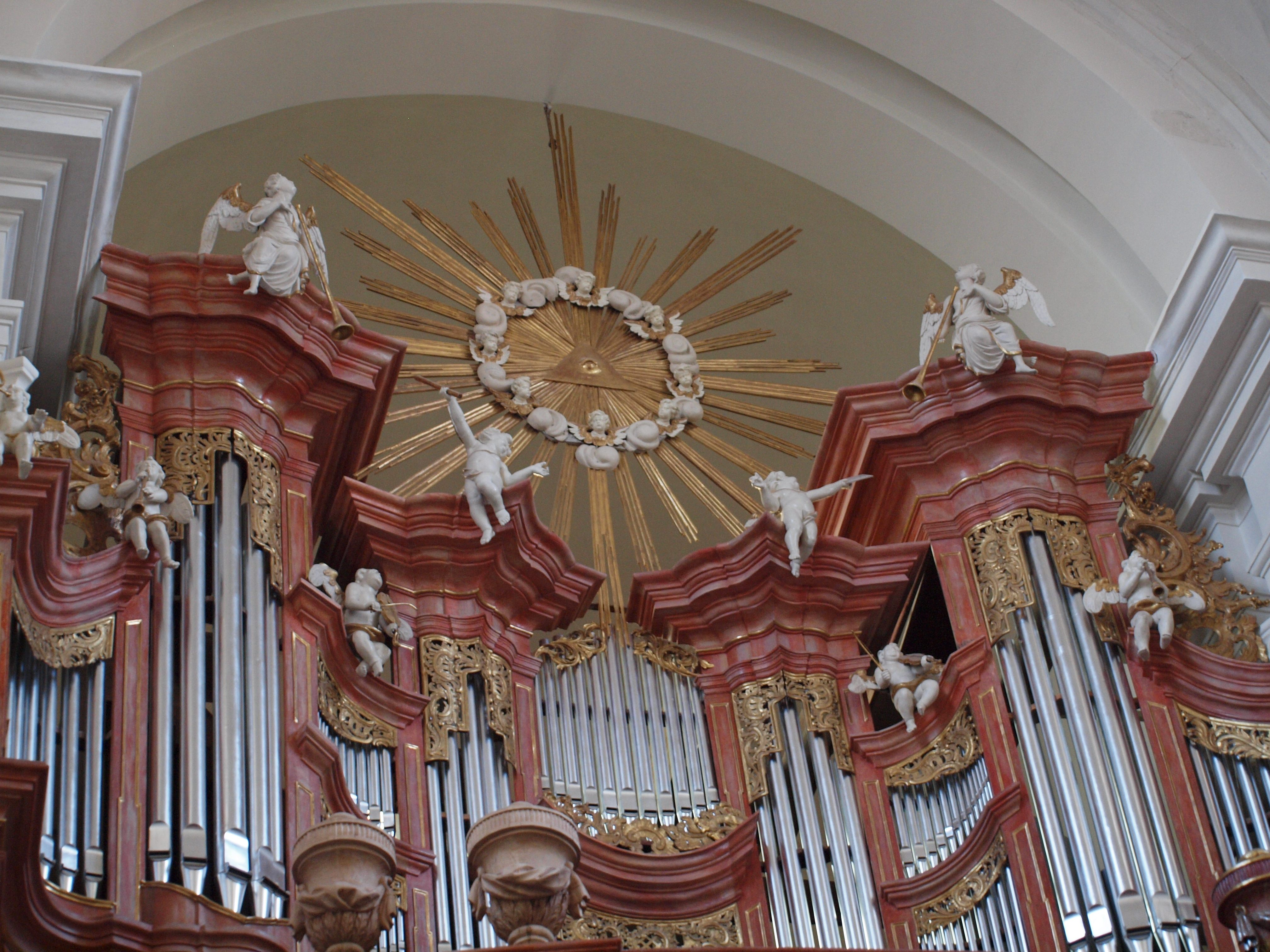 Paradyż, kościół p.w. Wniebowzięcia NMP - organy